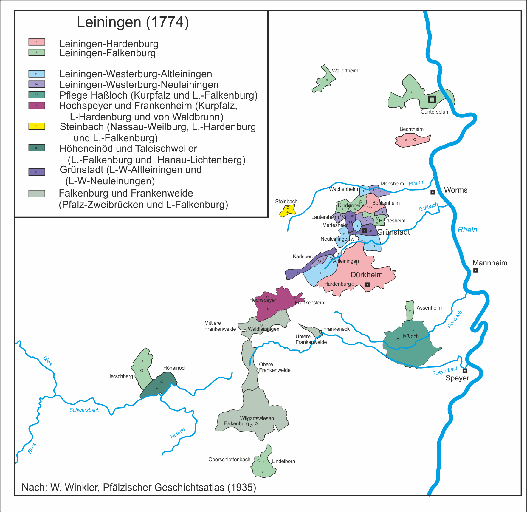 gebaseerd op Wilhelm Winkler, Pfälzischer Geschichtsatlas. (1935), kaart van 1789 terug bewerkt naar het moment dat het graafschap Falkenburg nog bestond.